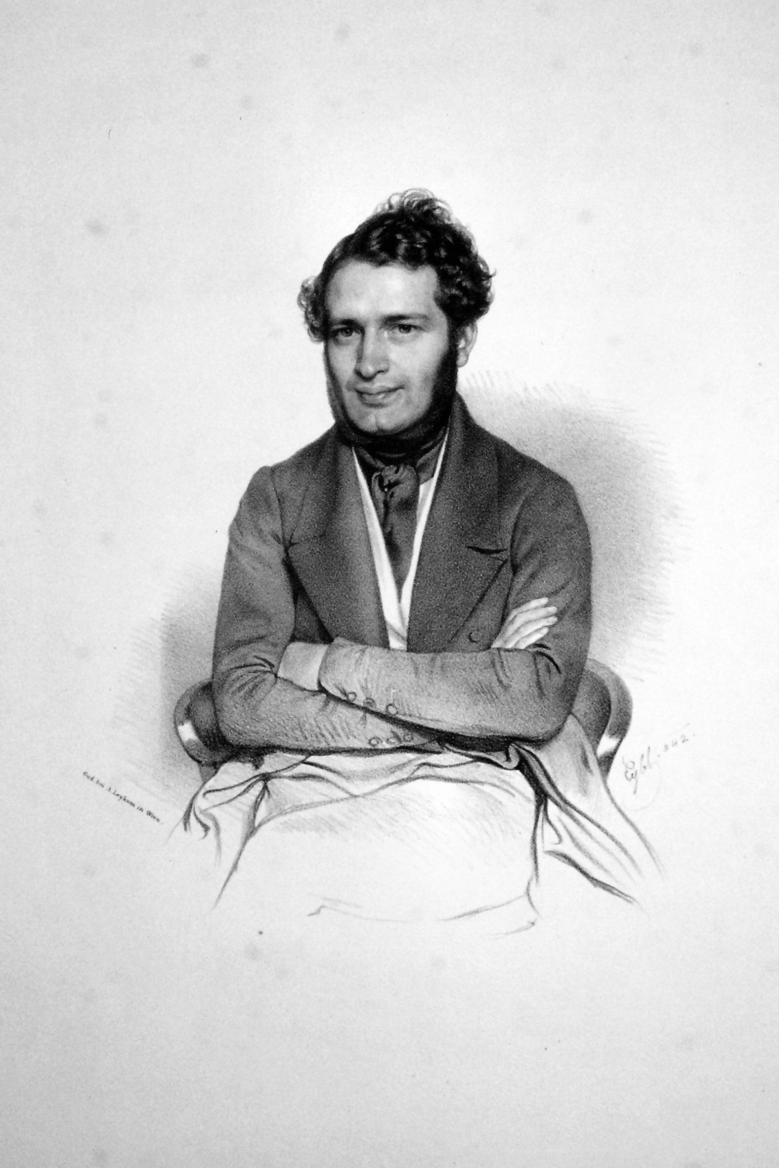 Leopold Freiherr von Neumann (1811-1888), österreichischer Völkerrechtler